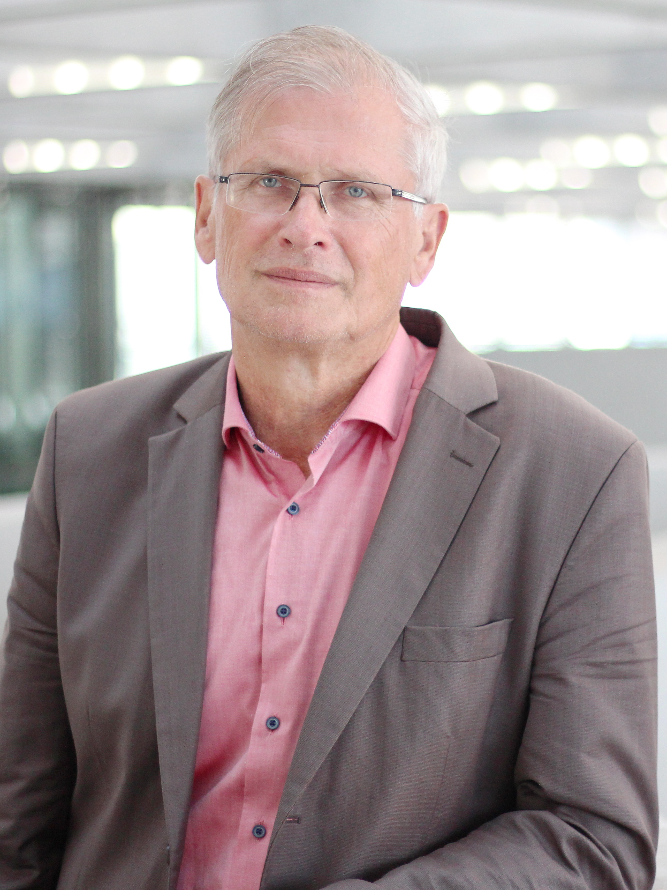 Martin Neumann im Jahr 2019. Mitglied des Deutschen Bundestages seit 2017. Sprecher für Energiepolitik der FDP-Bundestagsfraktion